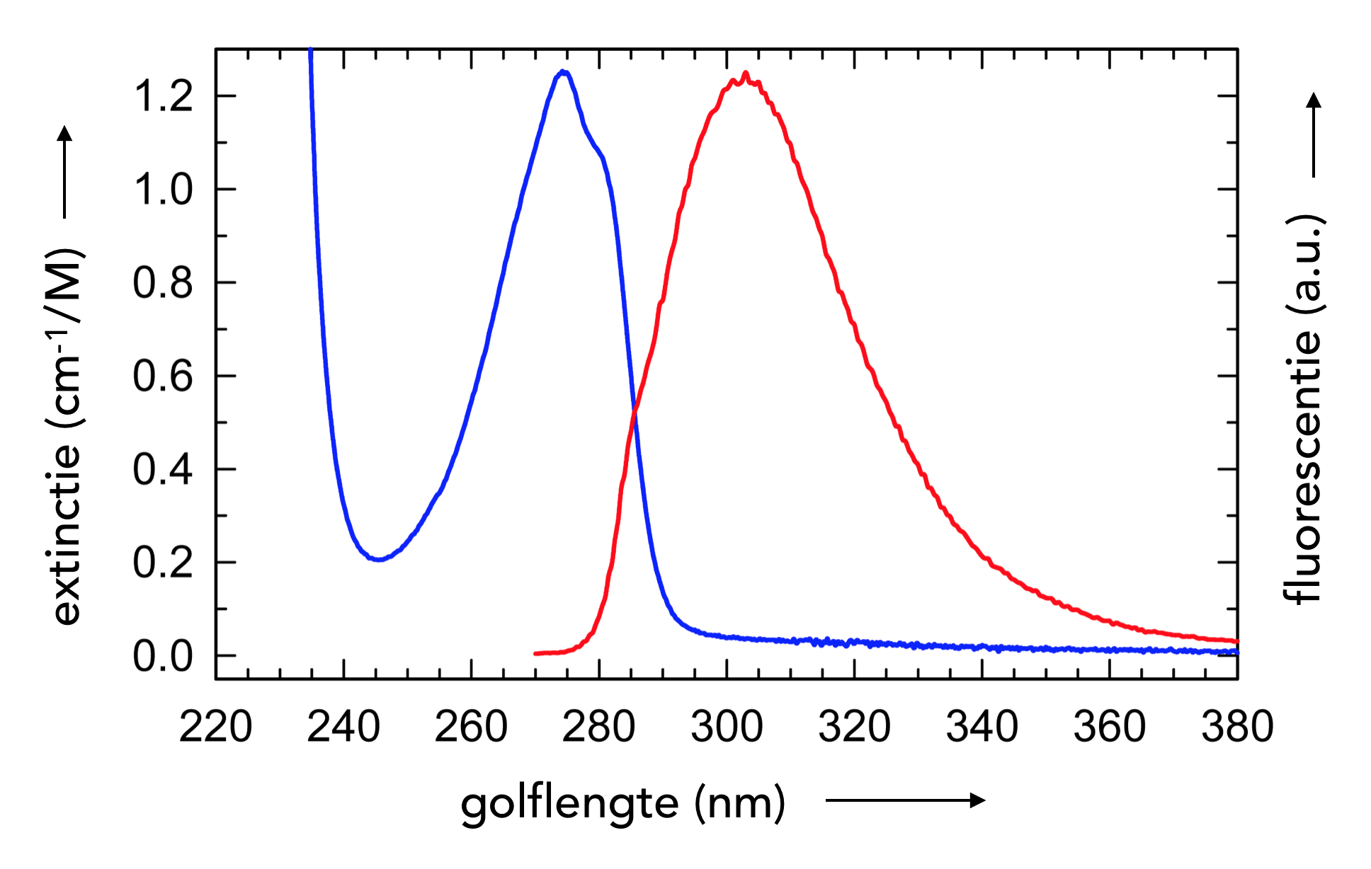 Grafiek van de extinctie en fluorescentie van tyrosine in waterige buffer.